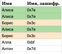 примет DET шифра, примененного к колонкам.